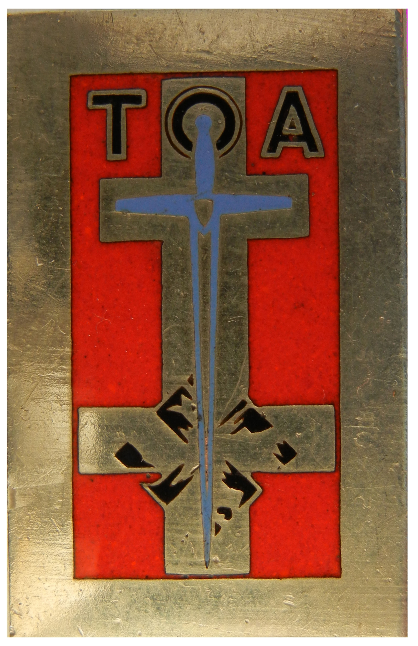 Insigne français des TOA (Troupes d'Occupation en Allemagne)